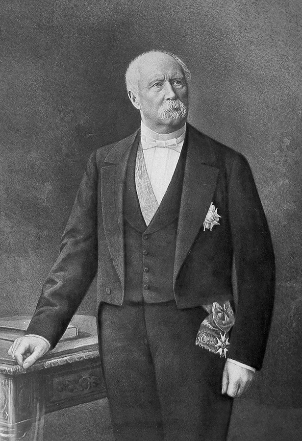 Patrice de Mac Mahon, portrait officiel (Pierre Petit photographe)